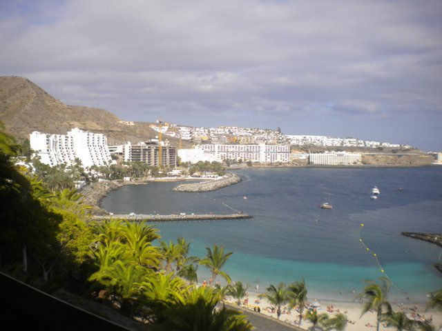 Gran Canaria - Archipielago Canario - España 2011